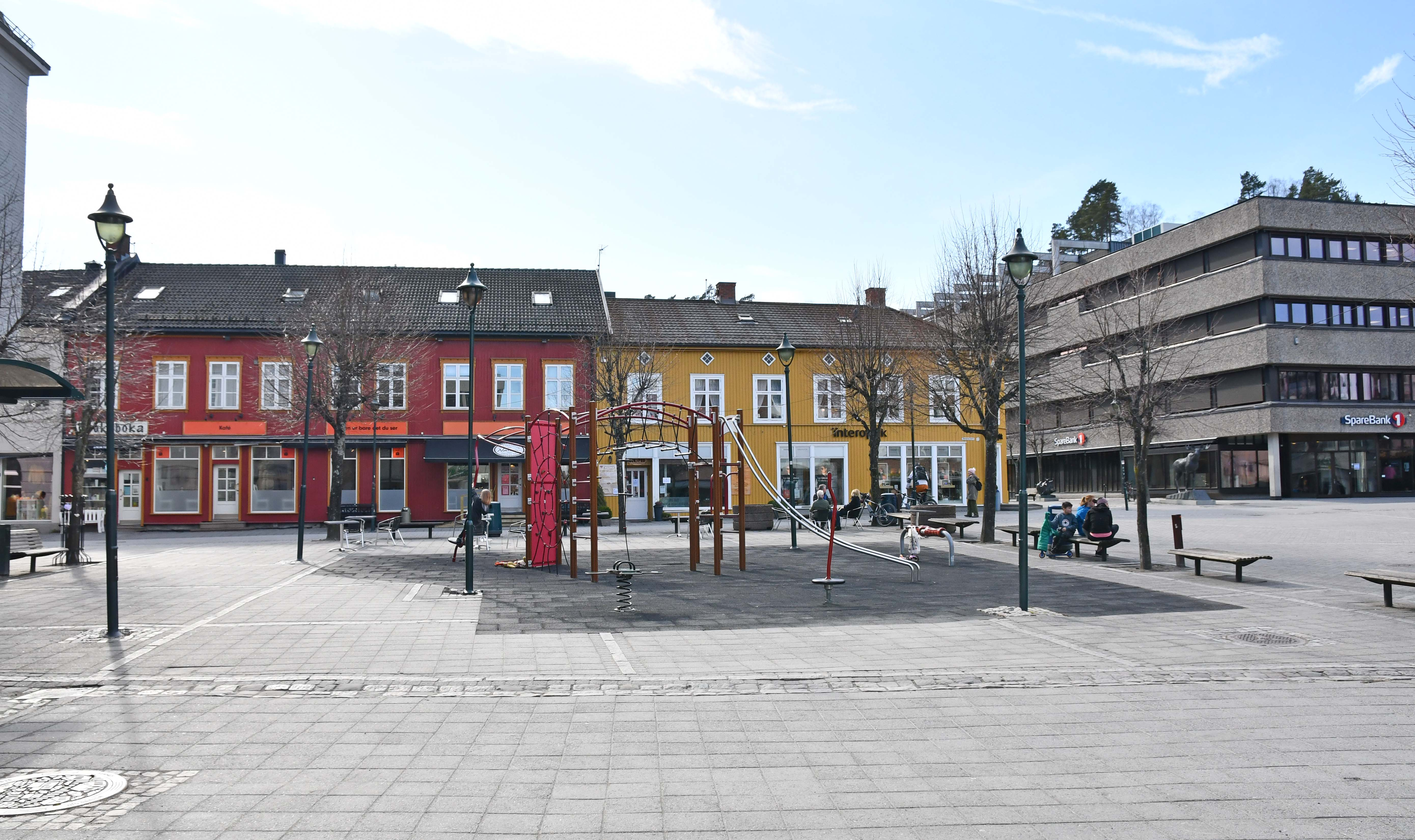 Søndre torv Hønefoss med lekeområdet og Søndre torv 7 og 8